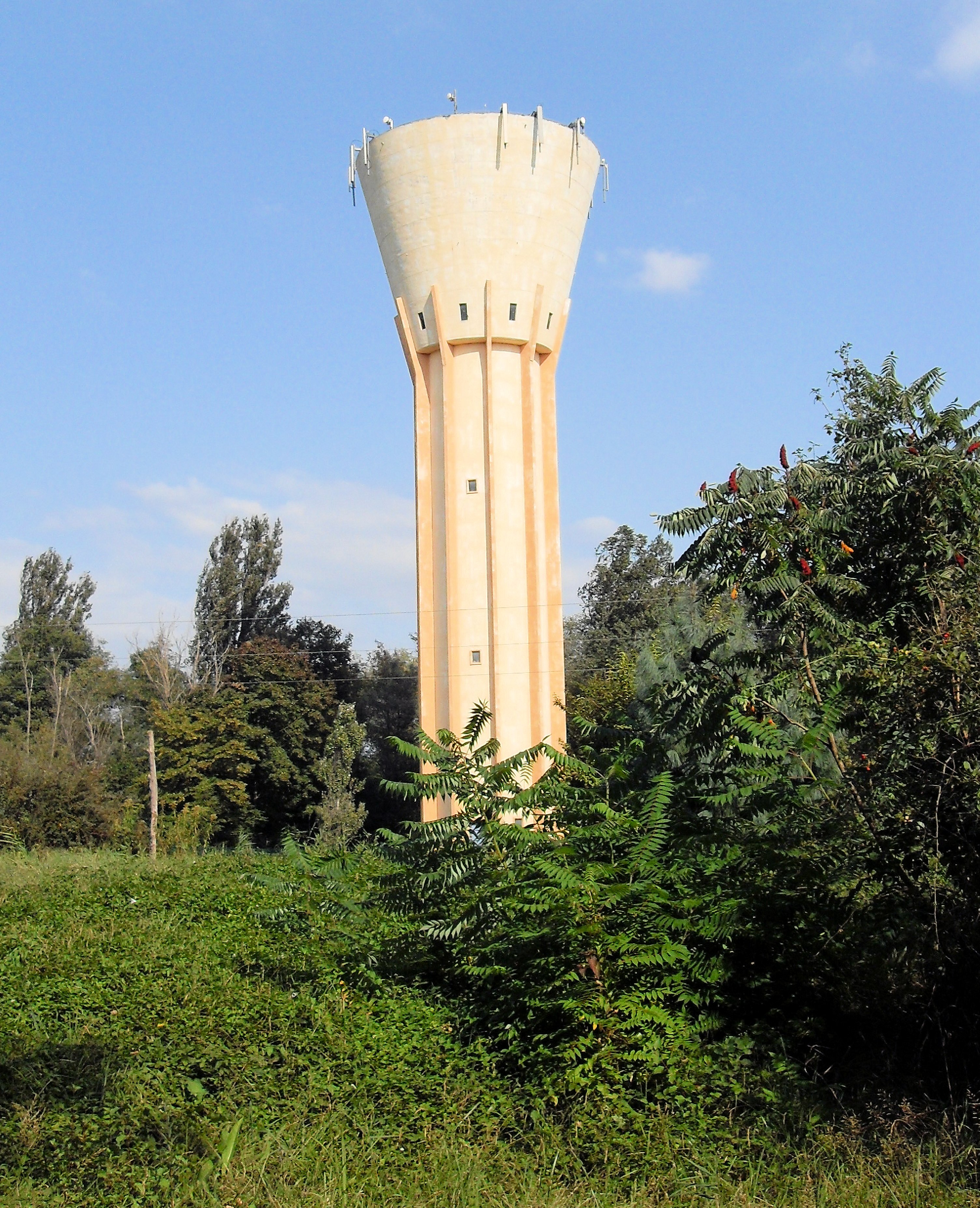 Le château d'eau à Biesheim